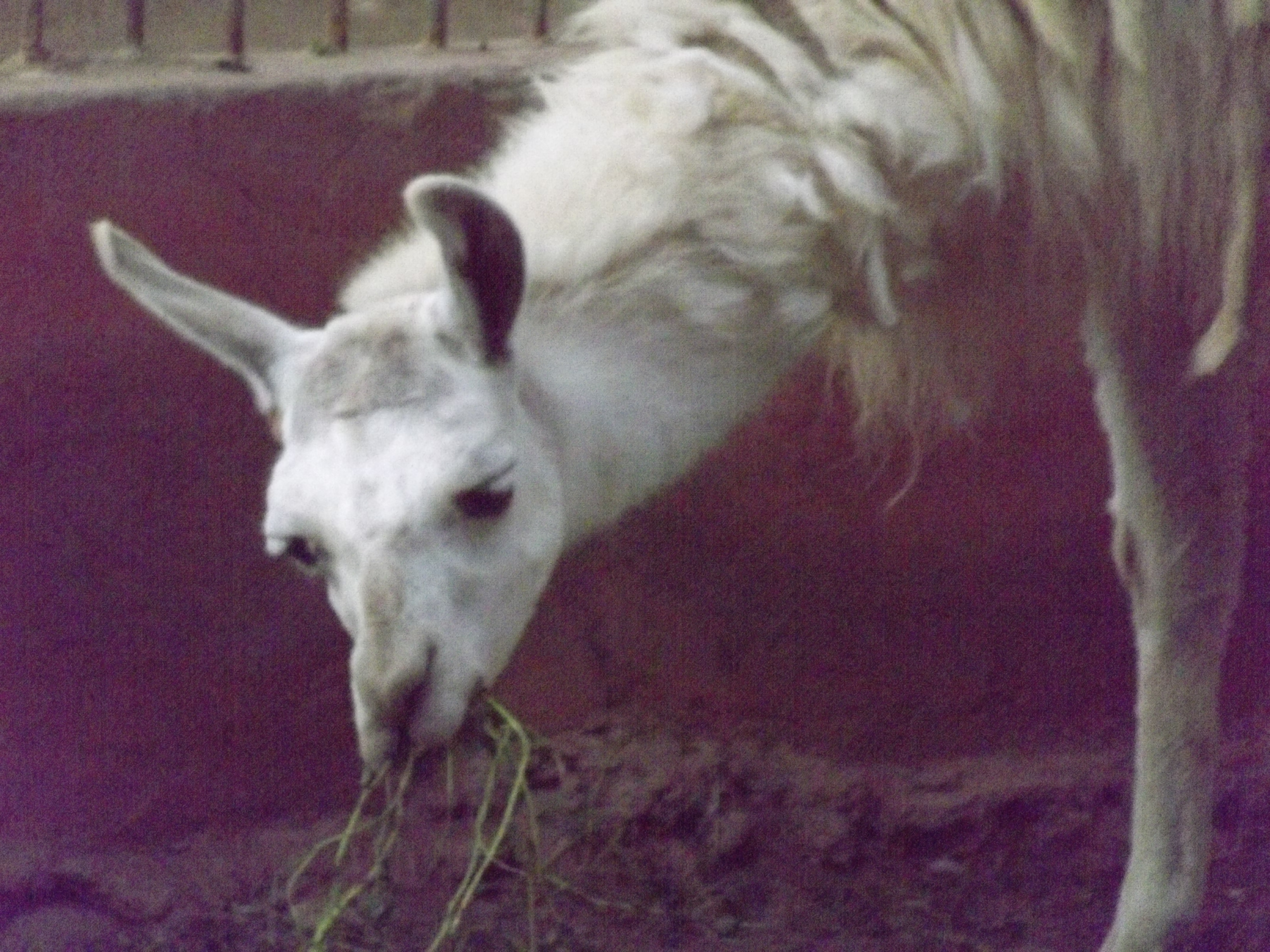 لاما أهلية